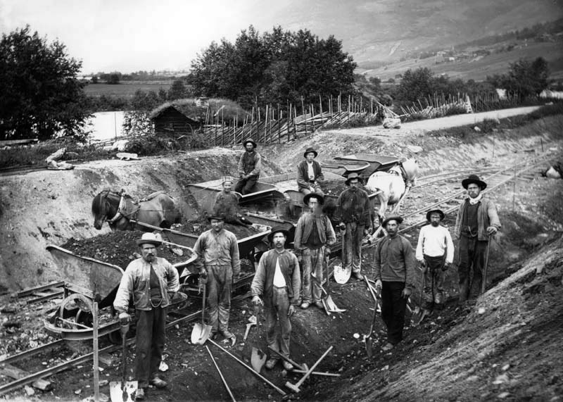 Jernbanen gjennom Gudbrandsdalen ble bygd på midten av 1890-åra, og skapte mange nye arbeidsplasser for husmenn. Fotografiet viser arbeidslaget til Hans H. Kirketeigen i Kvam i Nord-Fron i juni 1896